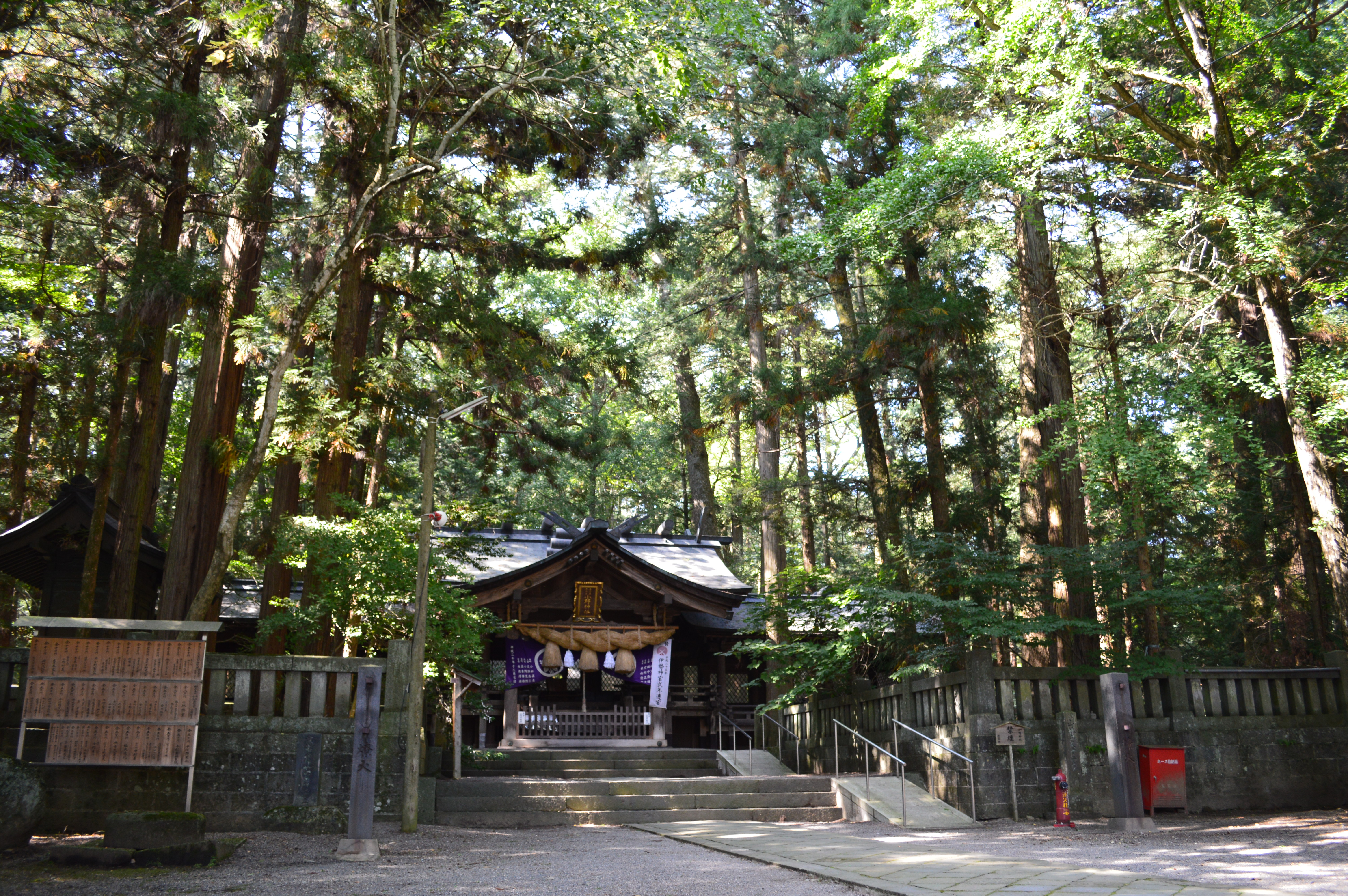 小野神社 (塩尻市) 境内